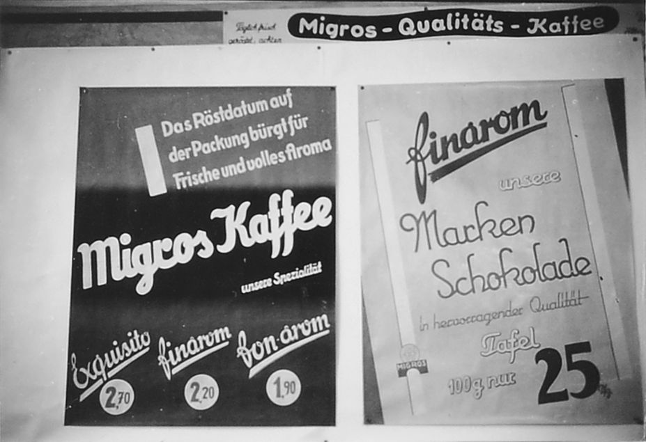 Migros Berlin, Werbung Kaffee und Schokolade